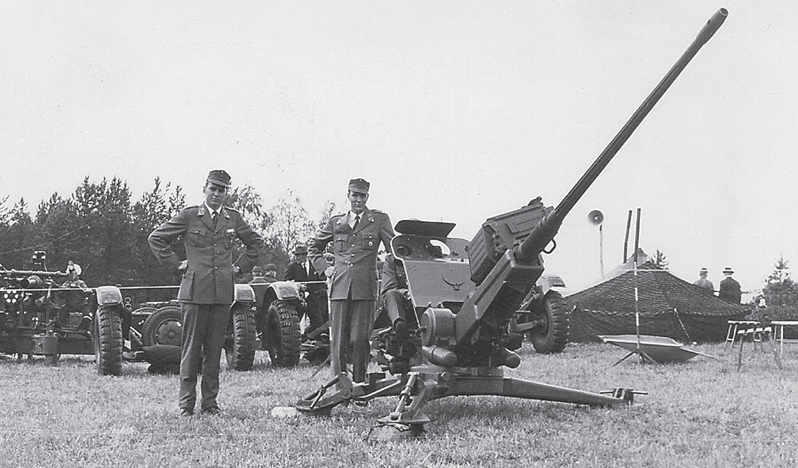 Luutnantit Heikki Happonen (vas) ja Ahti Lappi messuilla Rautiossa vuonna 1964.